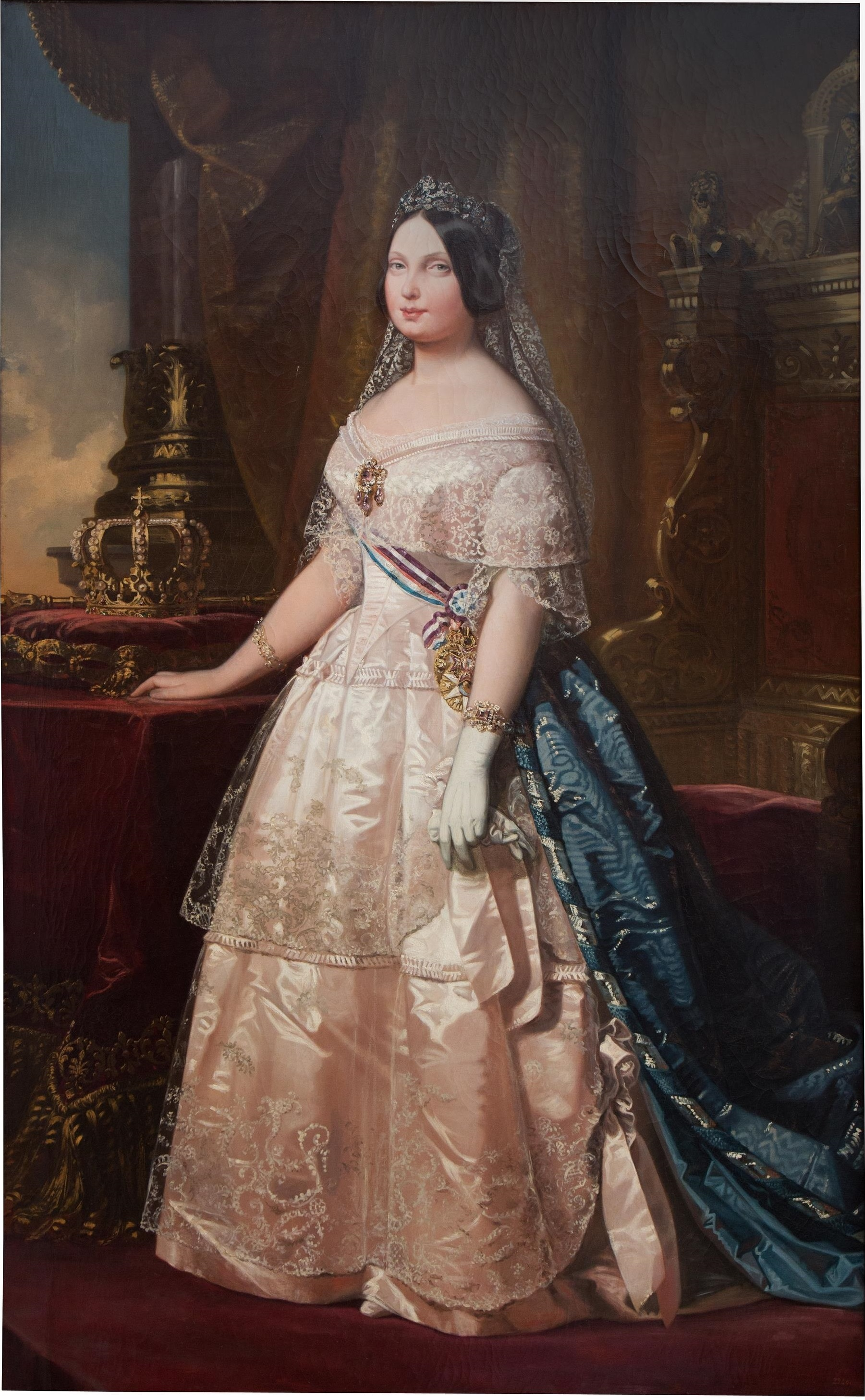 Retrato de la reina Isabel II de España (1830-1904), que fue la hija y heredera del rey Fernando VII y la madre de Alfonso XII. Este lienzo, que fue ejecutado por Isidoro Lozano, es una de las tres copias que posee el Museo del Prado del retrato de la reina que, pintado por Federico de Madrazo y Kuntz, se conserva en la Real Academia de Bellas Artes de San Fernando de Madrid. Esta copia fue realizada por Isidoro Lozano para concluir la Serie Cronológica de los Reyes de España, que fue encargada en 1847 por la reina Isabel II al pintor José de Madrazo.